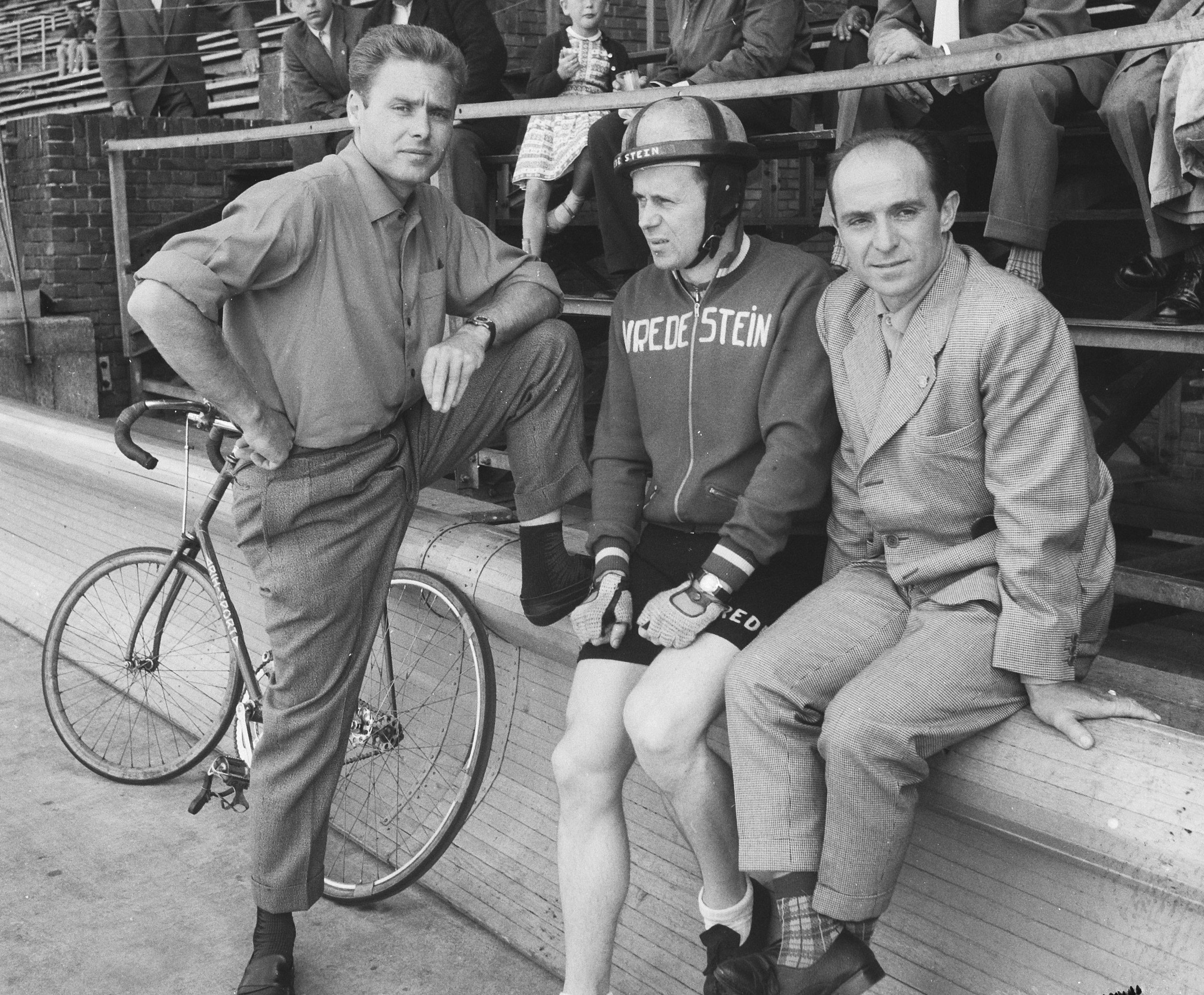 Collectie / Archief : Fotocollectie Anefo Reportage / Serie : [ onbekend ] Beschrijving : Voorbereidingen voor de wereldkampioenschap wielrennen v.l.n.r. de stayers De Paepe , Wierstra en Timoner Datum : 6 augustus 1959 Fotograaf : Noske, J.D. / Anefo Auteursrechthebbende : Nationaal Archief Materiaalsoort : Negatief (zwart/wit) Nummer archiefinventaris : bekijk toegang 2.24.01.03 Bestanddeelnummer : 910-5731